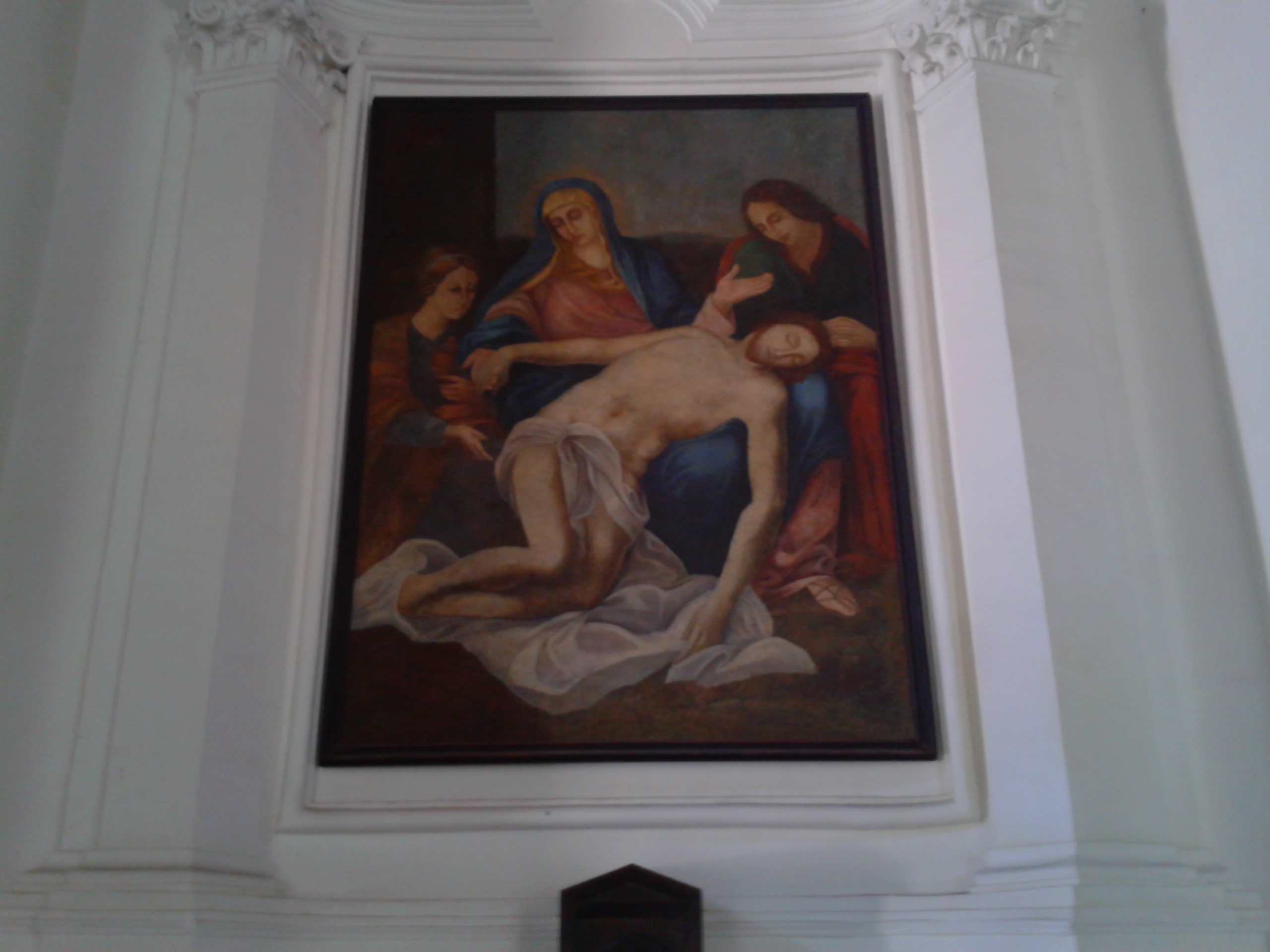 Deposizione chiesa del Crocifisso di Palmi